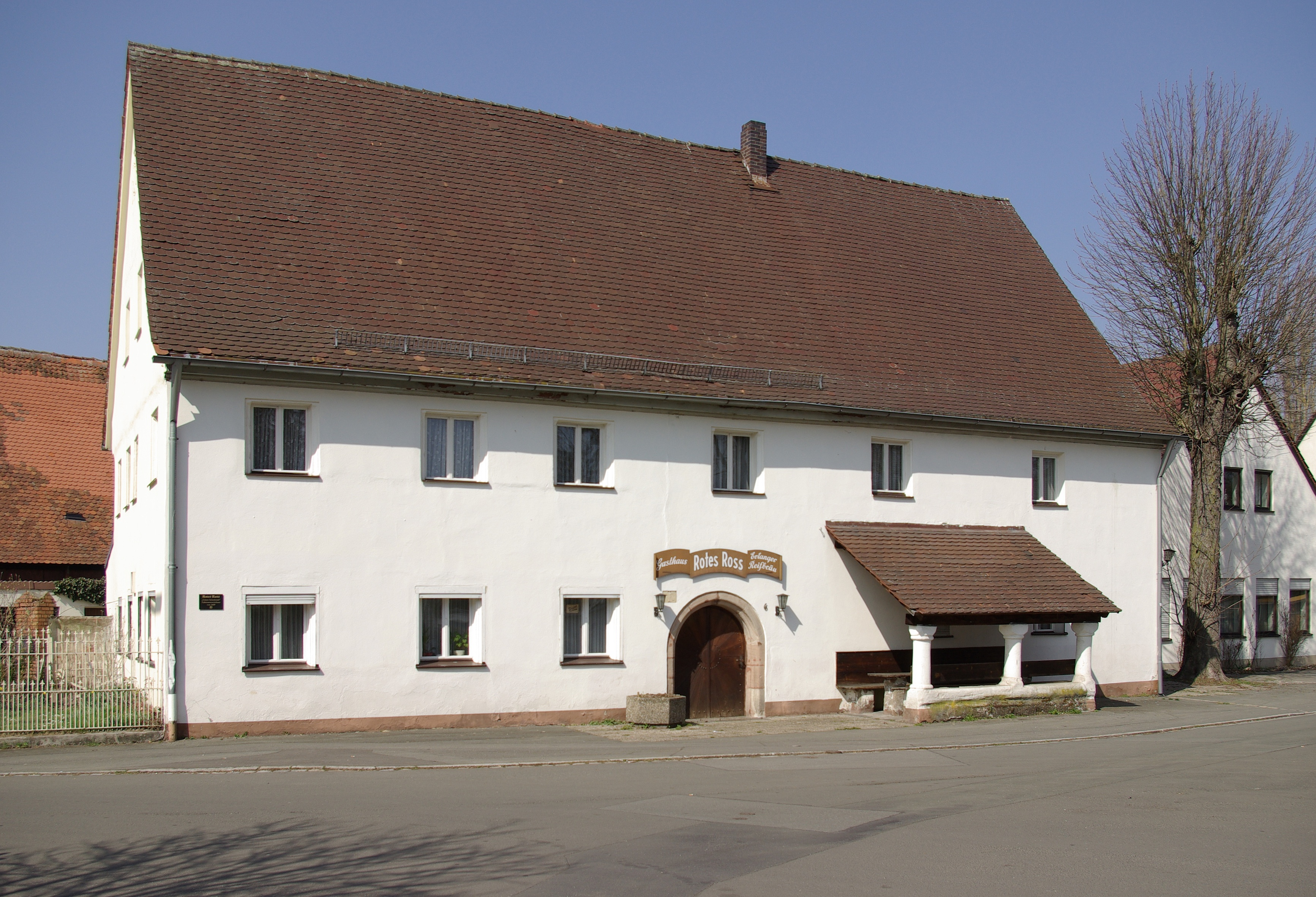 Gasthaus Rotes Ross (erbaut 1609) im Erlanger Stadtteil Tennenlohe